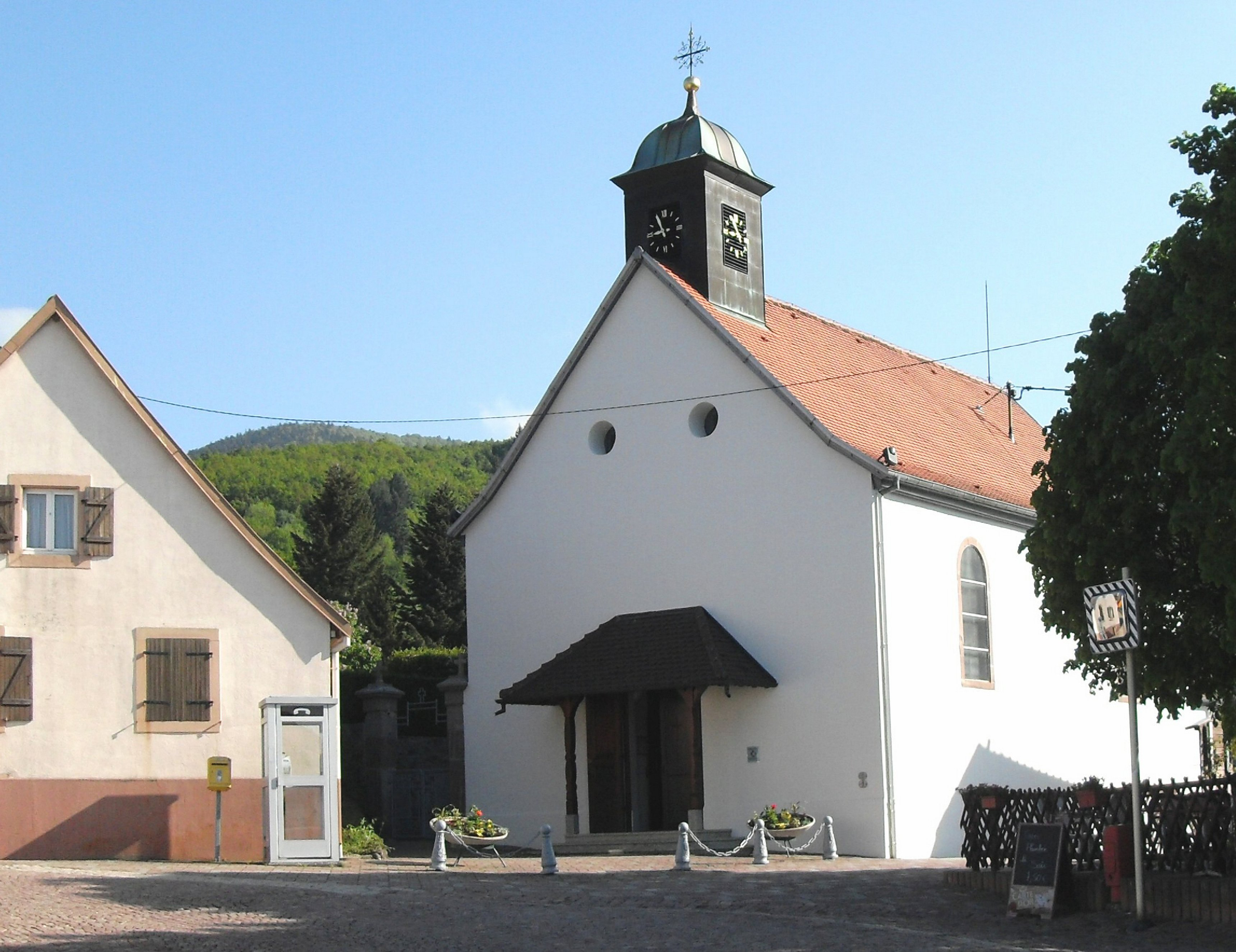 L'église Saint-Apollinaire à Bourbach-le-Haut